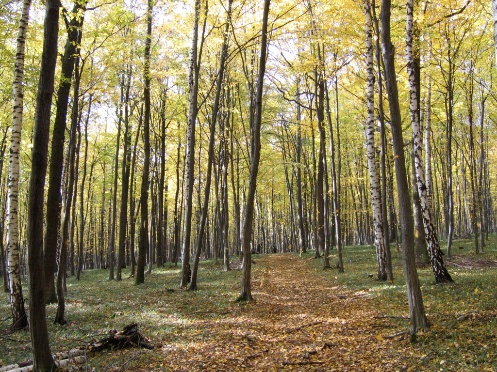 Les v okolí Uherského Brodu v lokalitě Újezdec. Autor Ervín Pospíšil